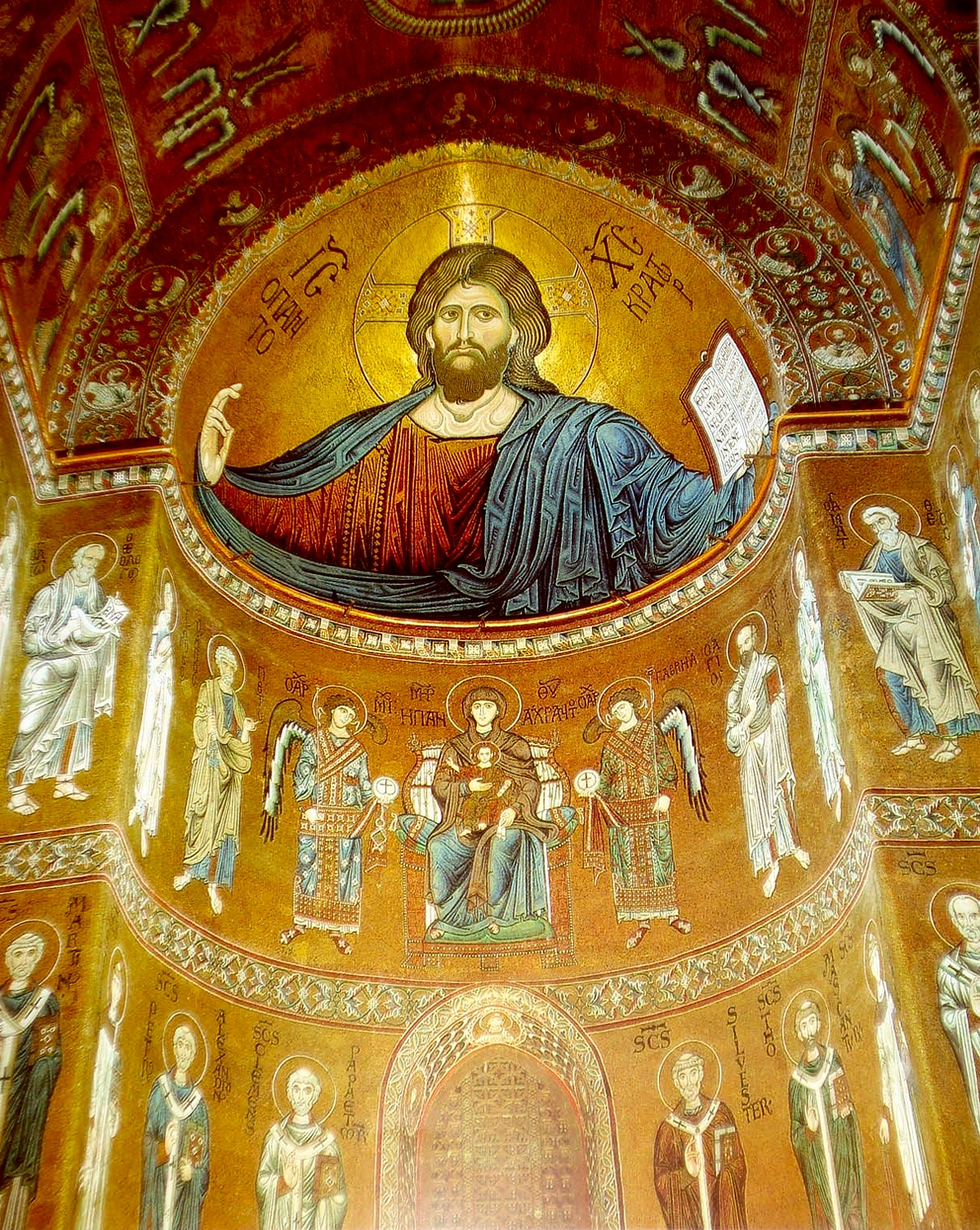 Cattedrale di Monreale, Сhrist Pantocrator. Христос Вседержитель в апсиде собора Монреале